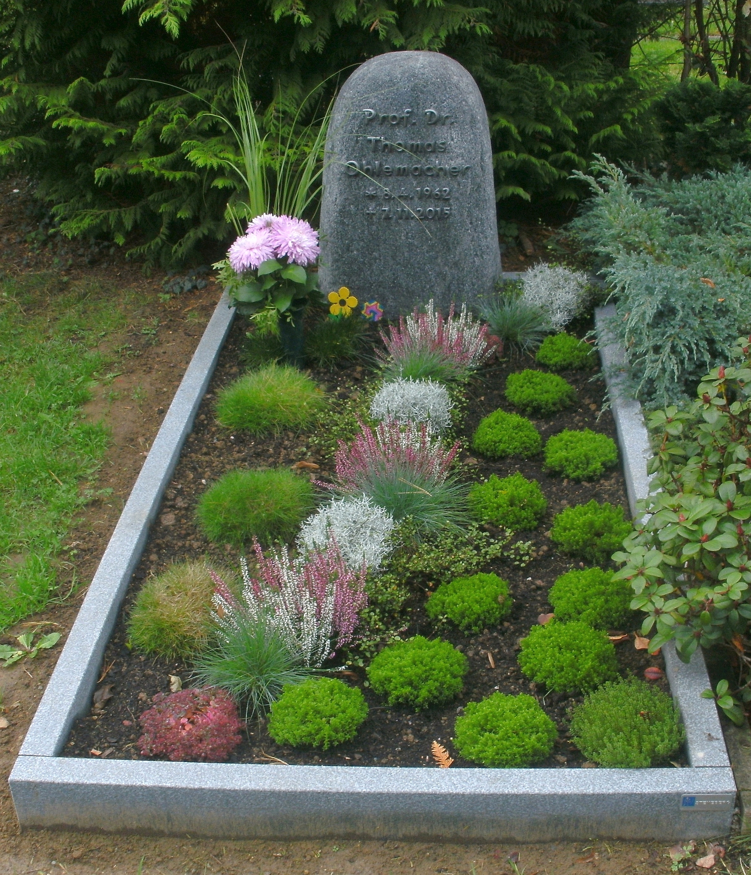 Göttingen-Weende, Friedhof der ev.-luth. Kirchengemeinde St. Petri Weende: Grab von Prof. Dr. Thomas Ohlemacher (2016)